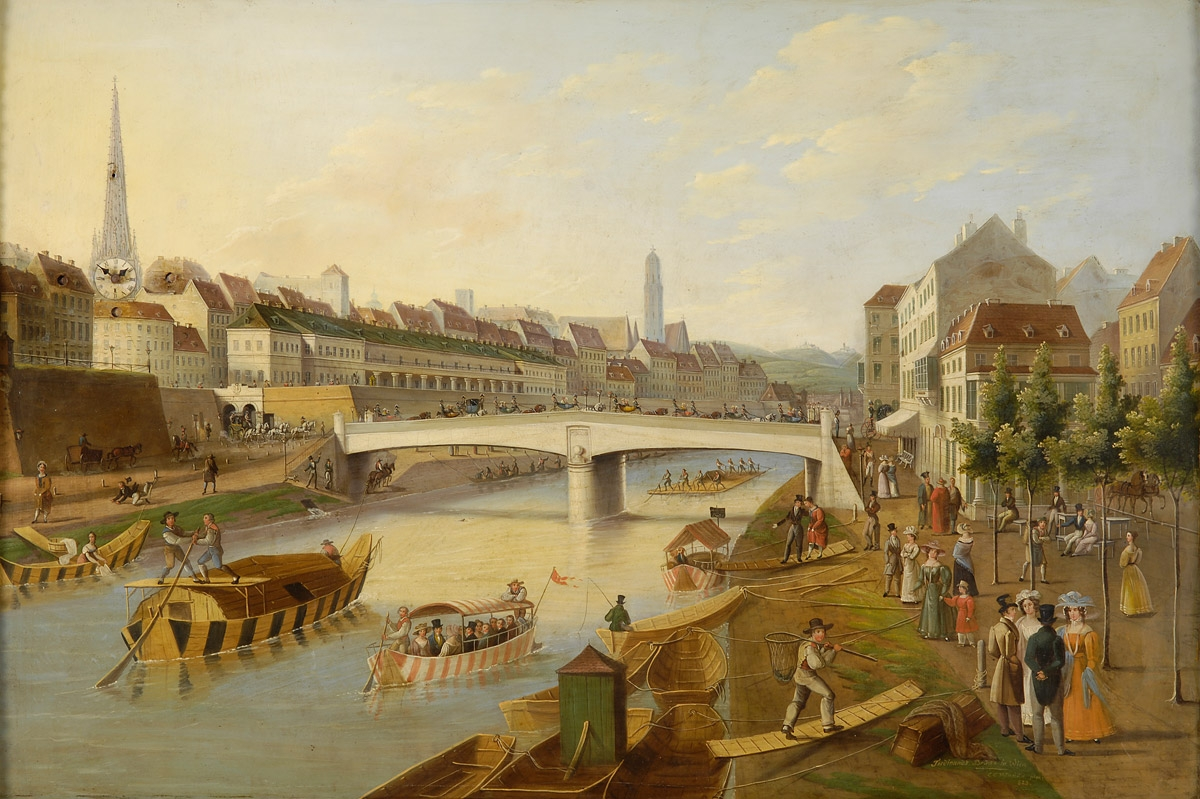 Ferdinand's Brücke in Wien.